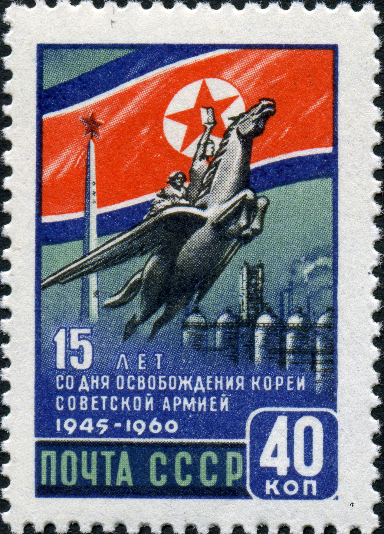 Марка СССР. ЦФА 2506. Крылатый конь Чхоллима - символ стремительного развития республики